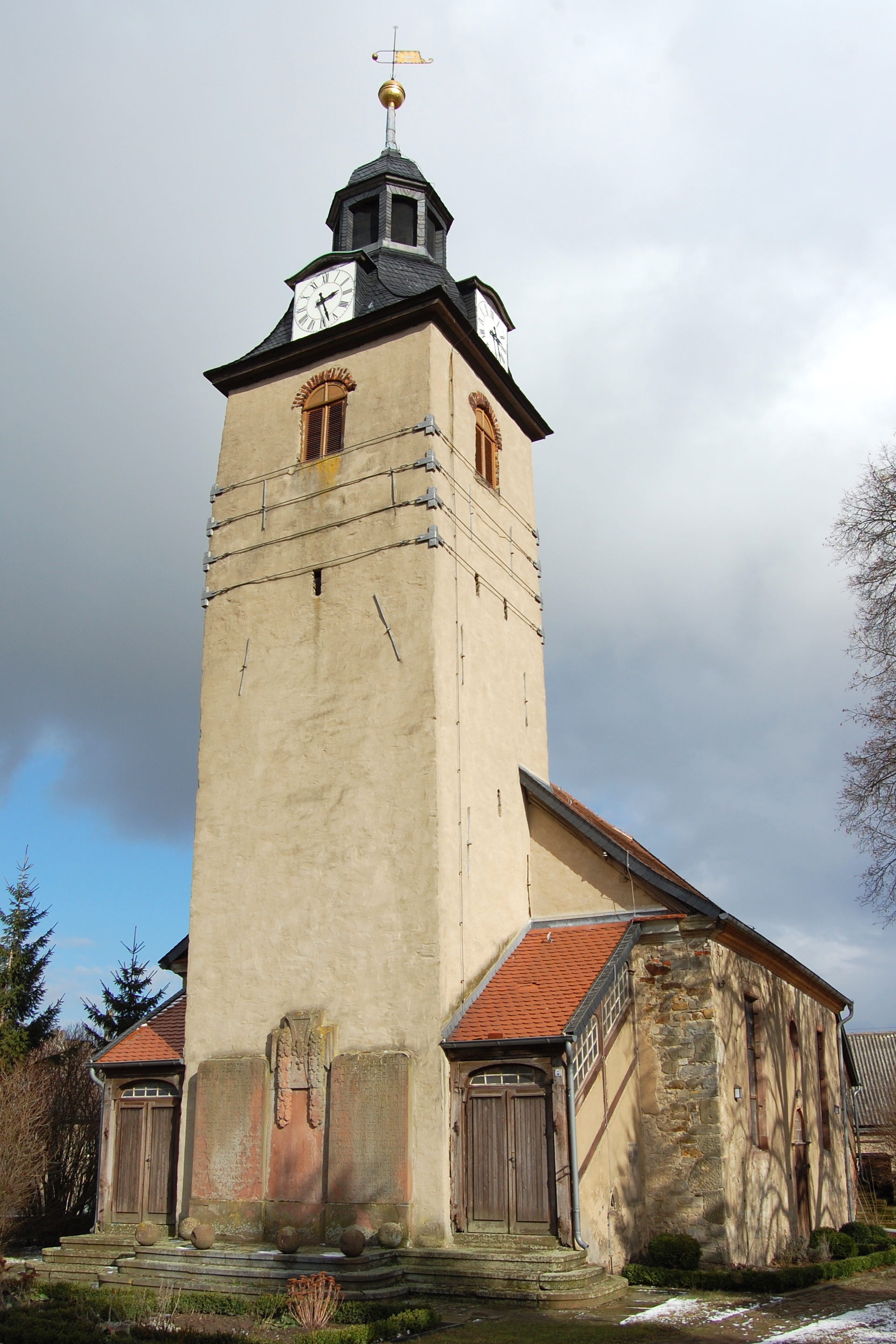 Sankt-Petri-Kirche Eimersleben